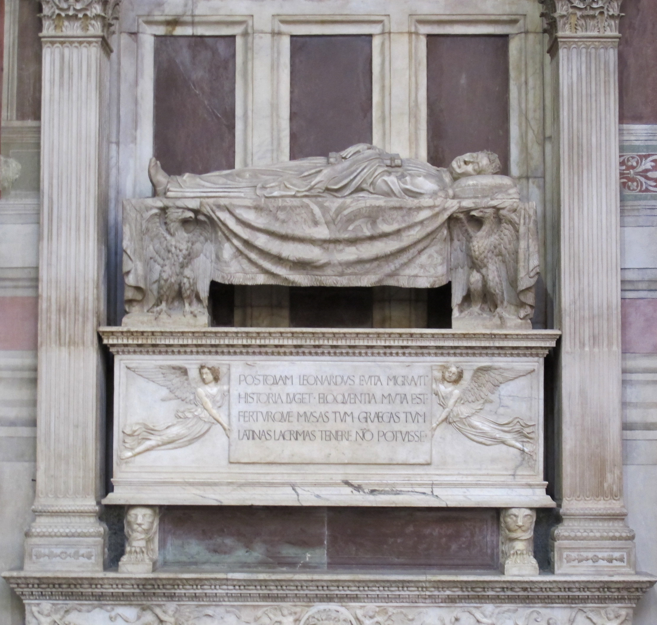 Bernardo rossellino, tomba bruni